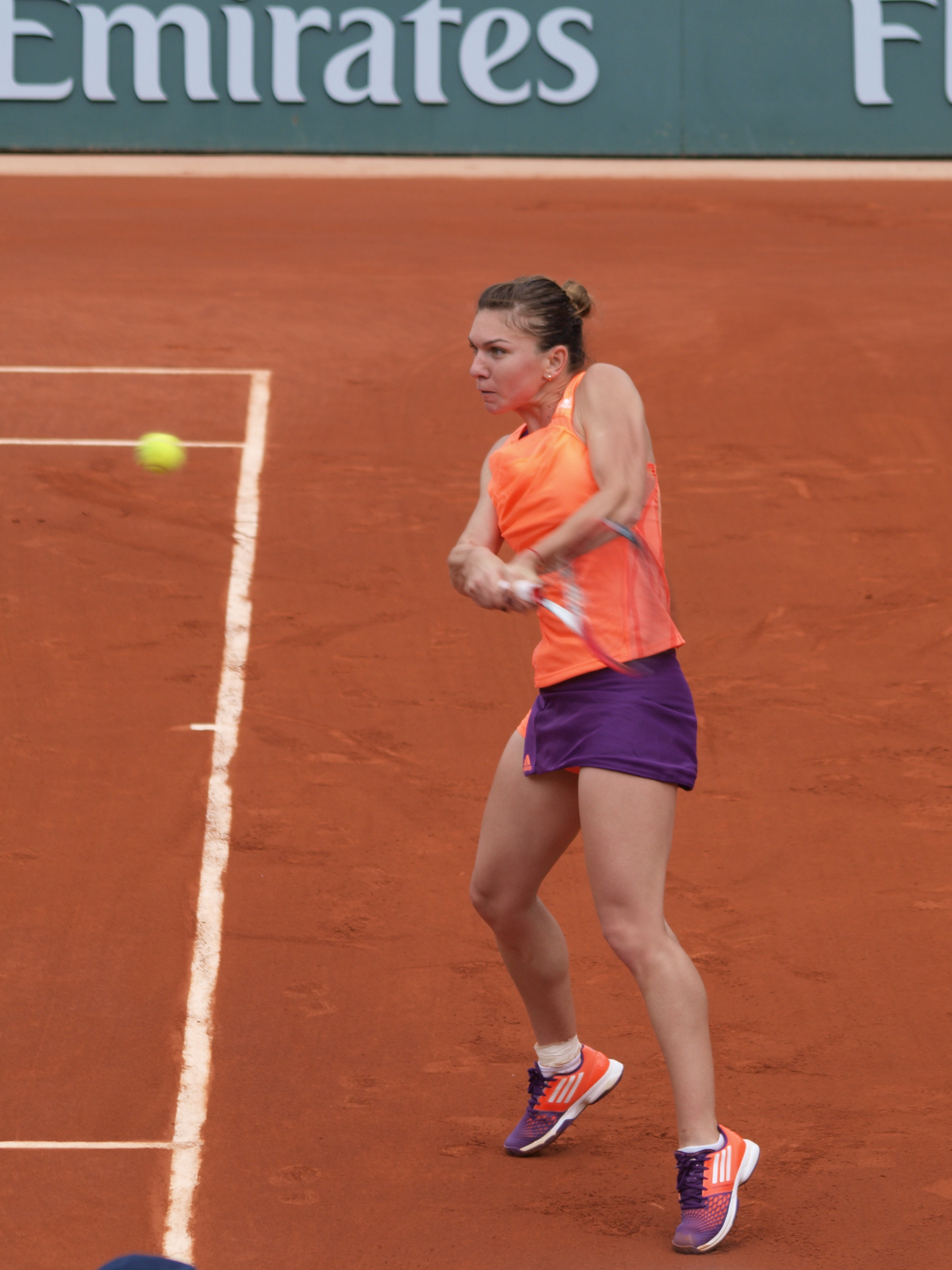 Internationaux de France de tennis, le 2 juin 2014, sur le court Philippe Chatrier : Simona Halep